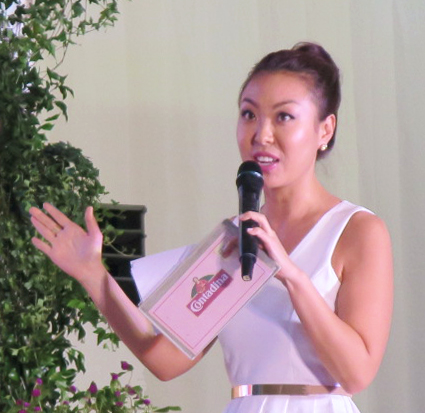 Sam Oh in Manila